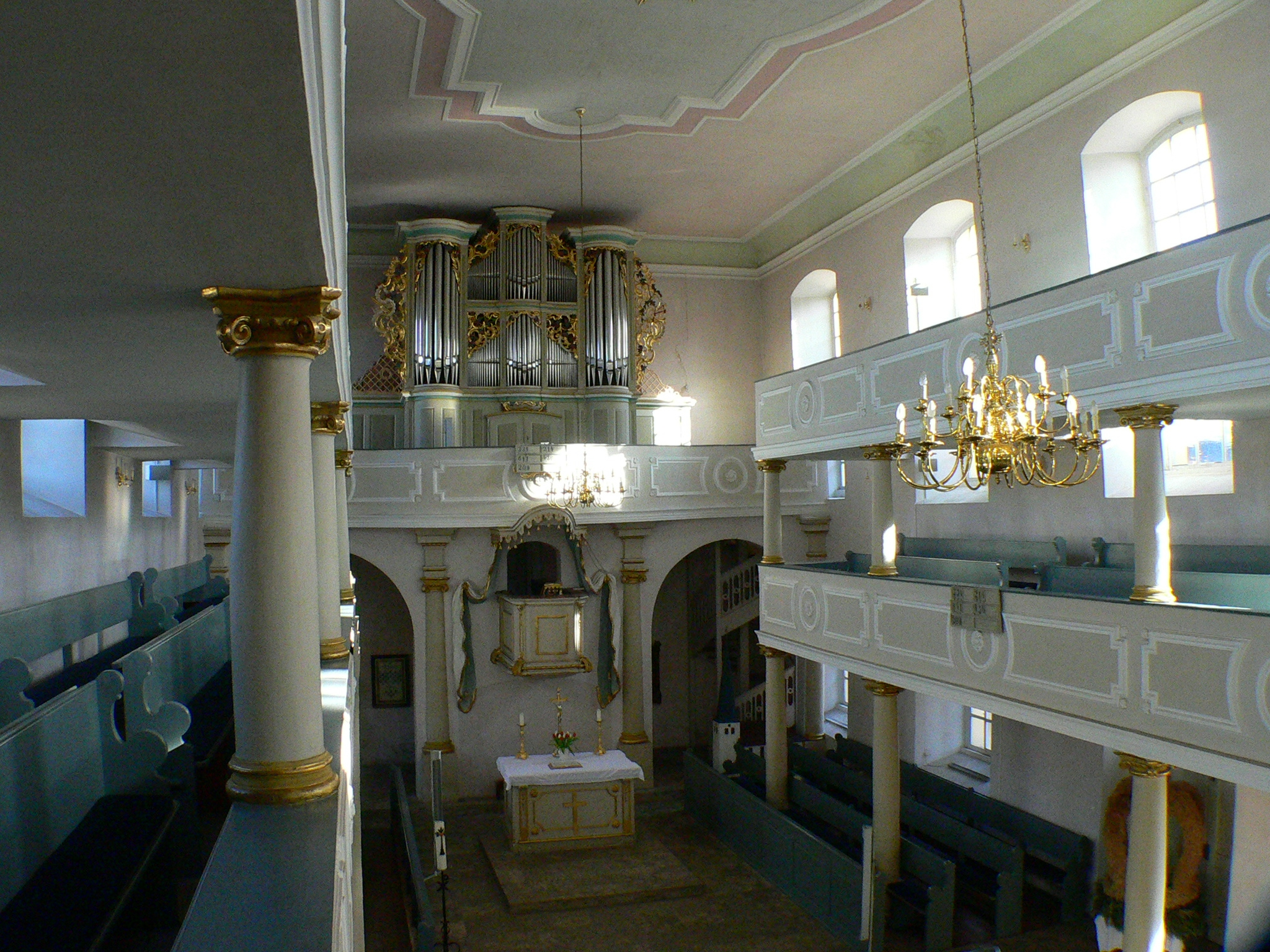 Gauerstadt evangelische Kirche Innenraum